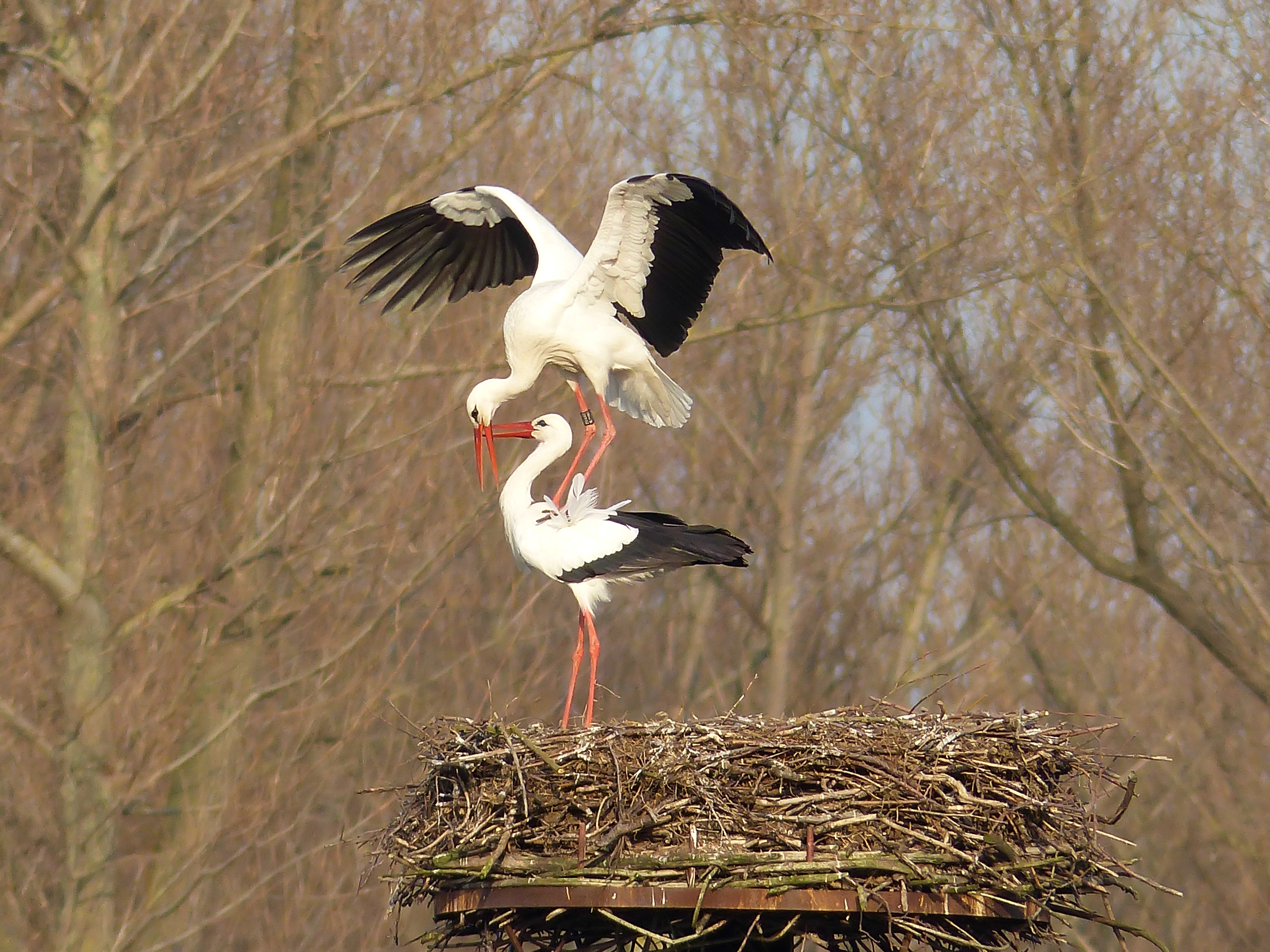 Storchenpaar in Hellinghausen